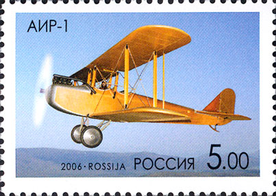 Почтовая марка России